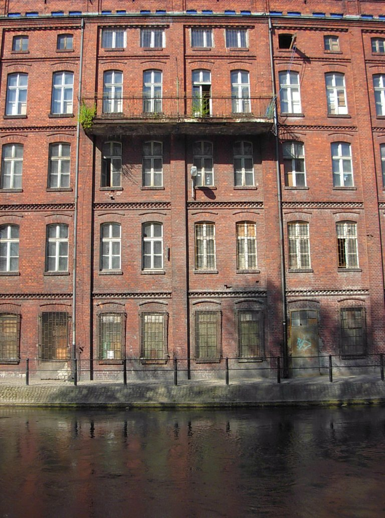 Farbiarnia W. Koppa - fragment Wenecji Bydgoskiej